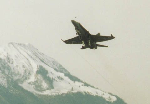 F/A-18C der Schweizer Luftwaffe über dem Flugplatz Buochs, 2003